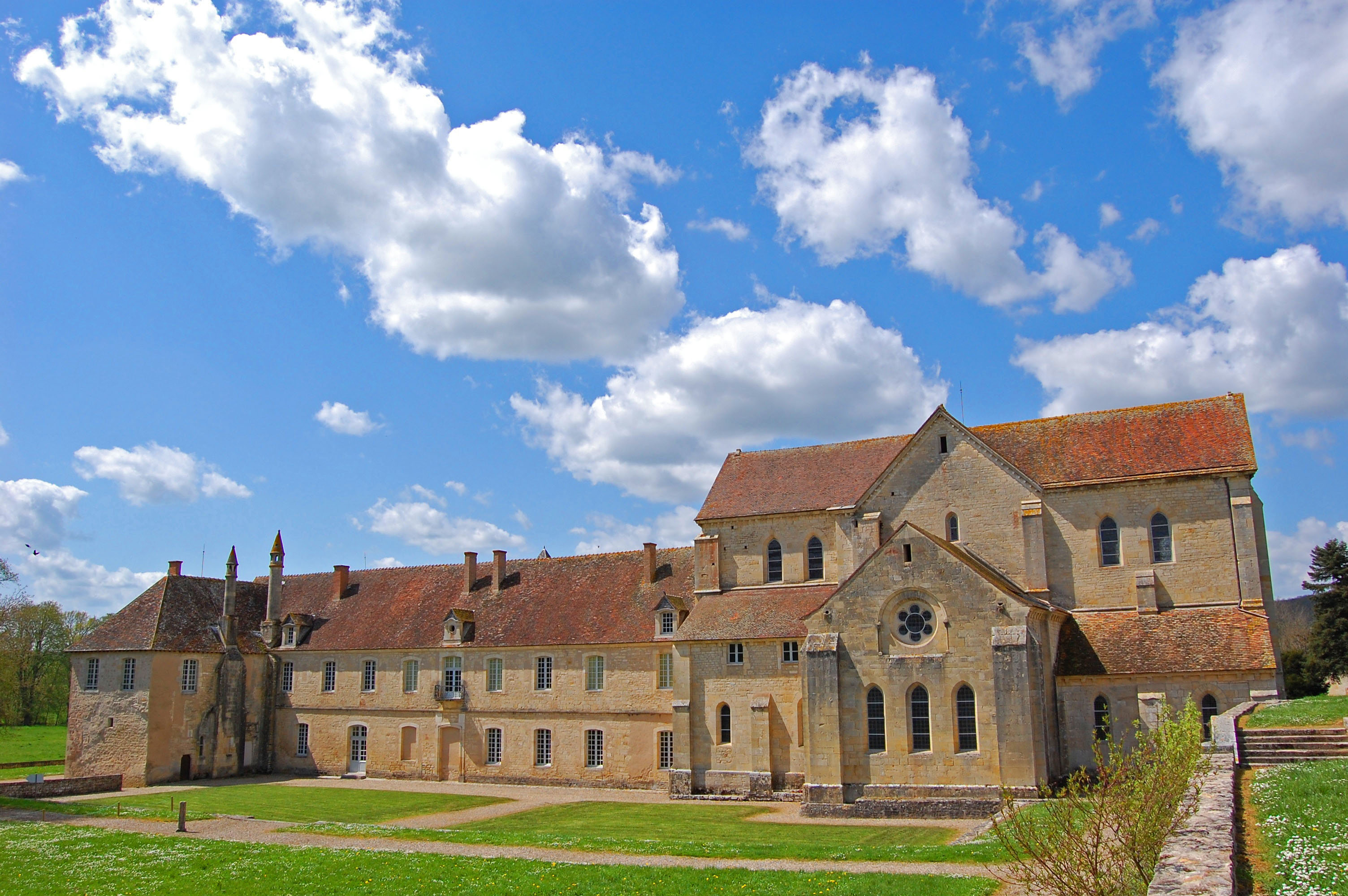 Façade east de l'Abbaye de Noirlac (Cher), Facciata Est dell'abbazia di Noirlac, Façade east of the Noirlac Abbey